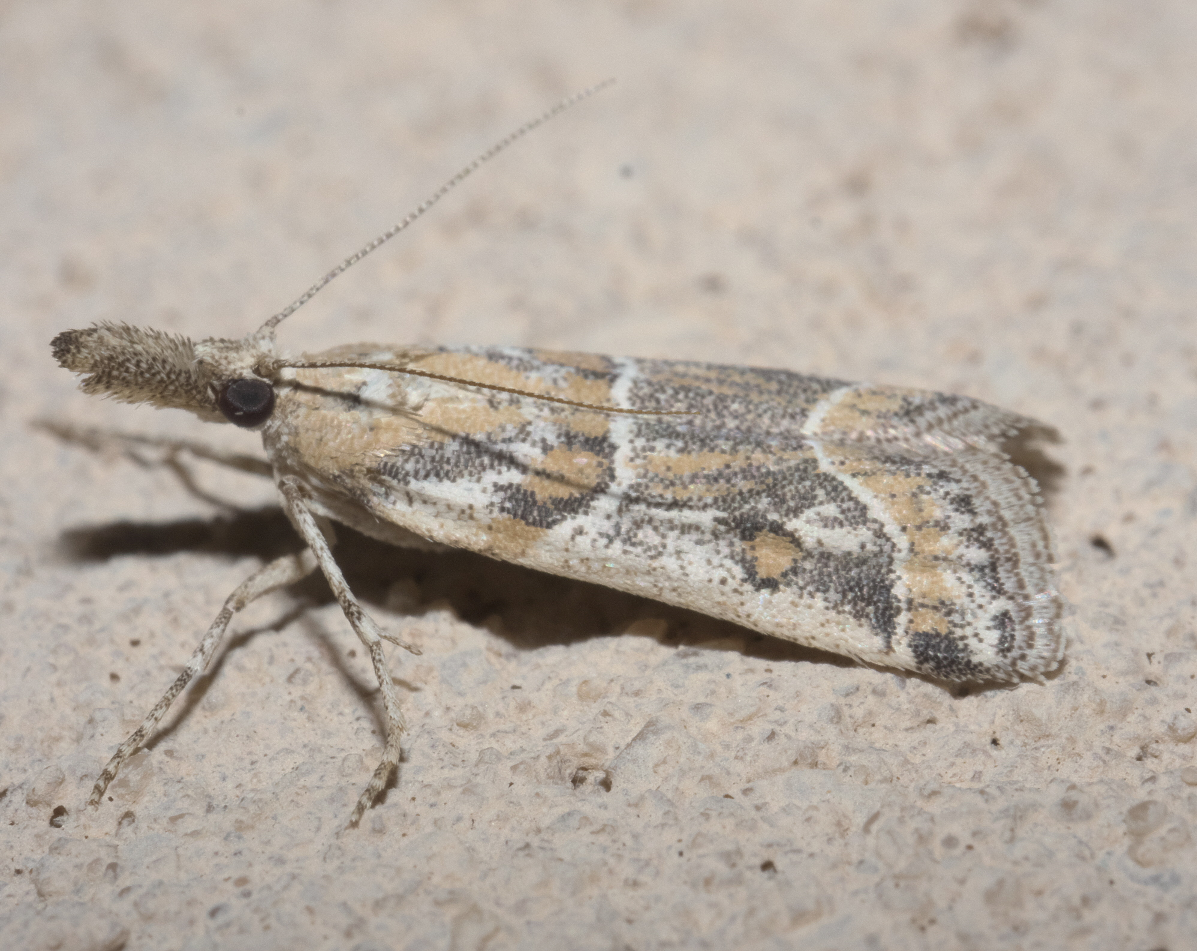 Martia arizonella, Hodges #5903, Size: 12.8 mm, ID Confidence: 92